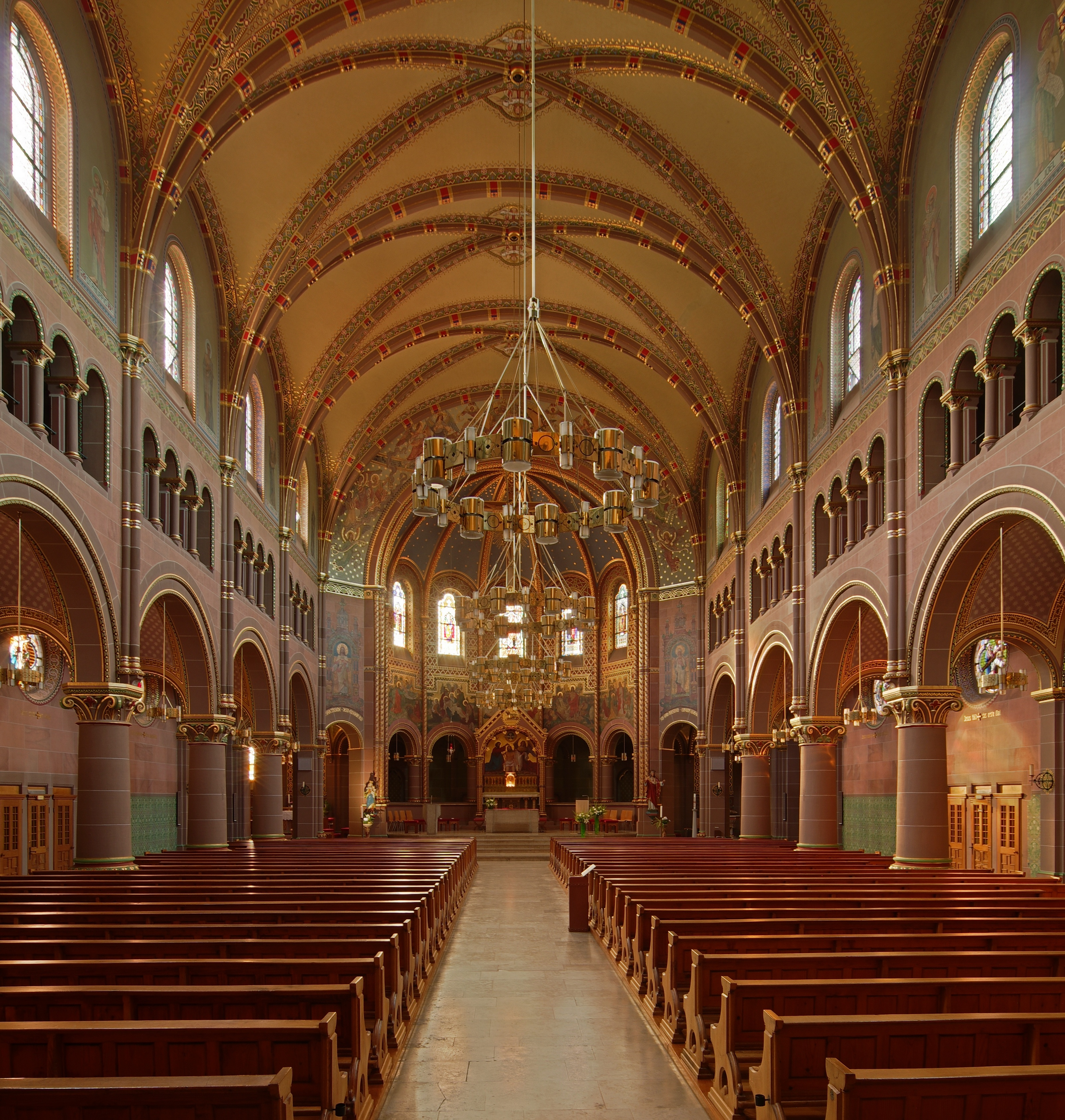 Innenraum der neoromanischen Kiche St. Johannes der Täufer in Forbach, Landkreis Rastatt. Blick vom Eingang zum Chor.